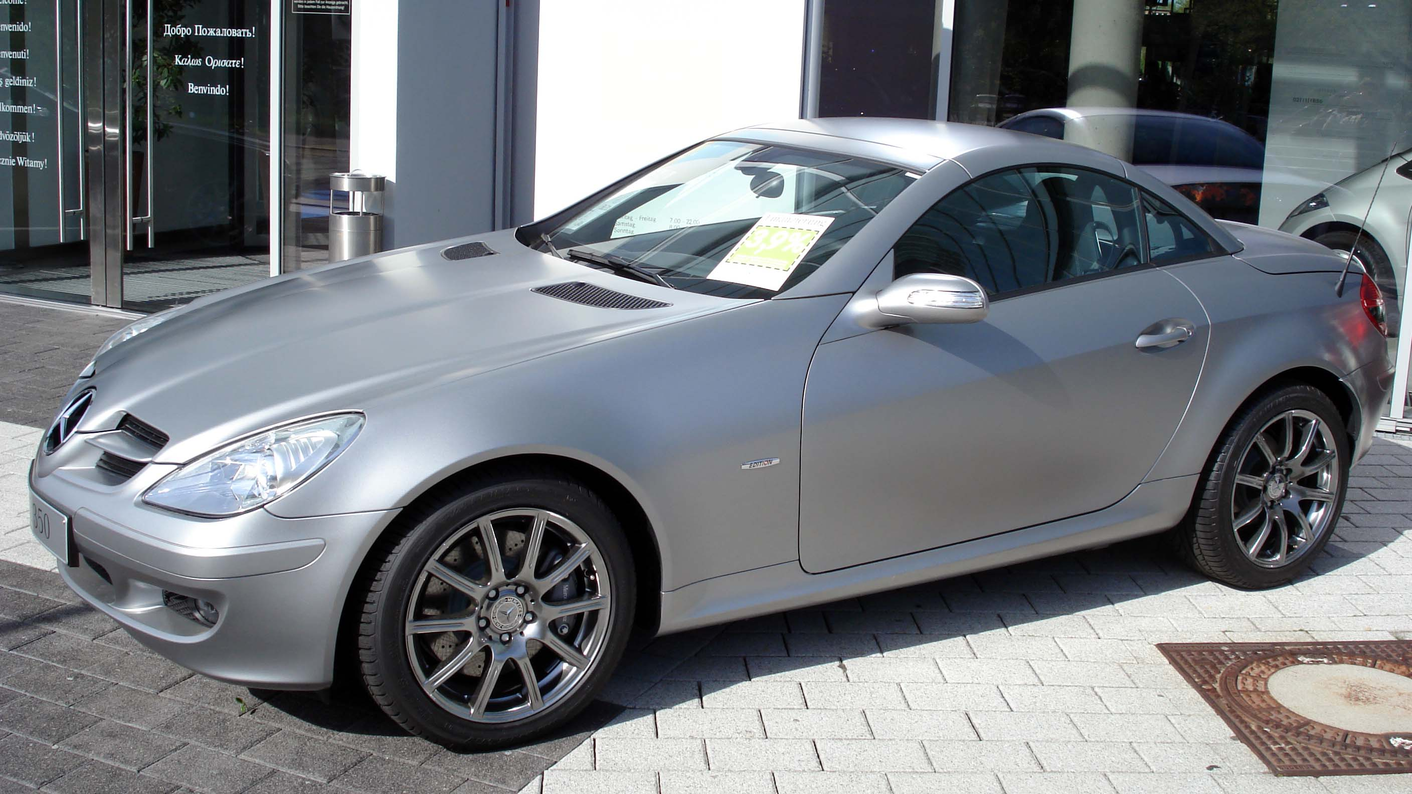 Mercedes-Benz SLK 350 Edition 10